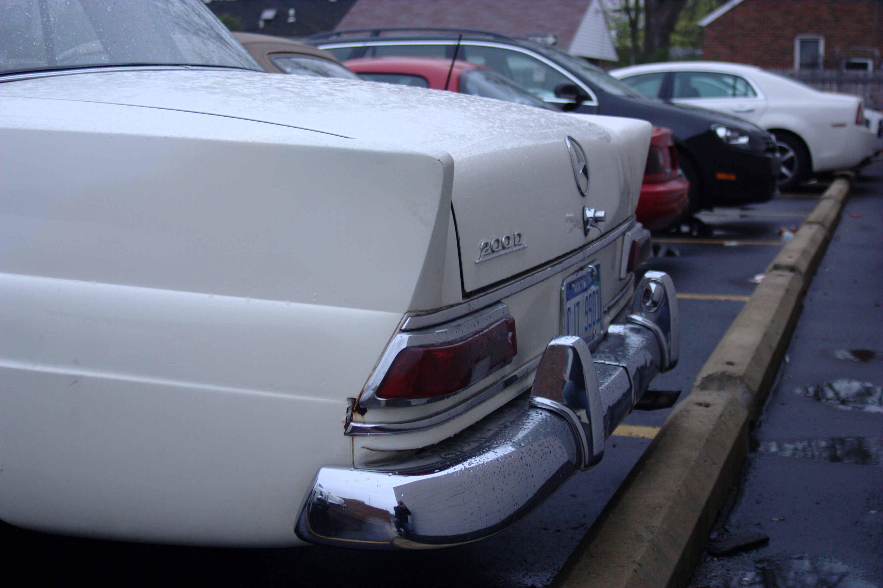 1966 Mercedes-Benz 200D Heckflosse